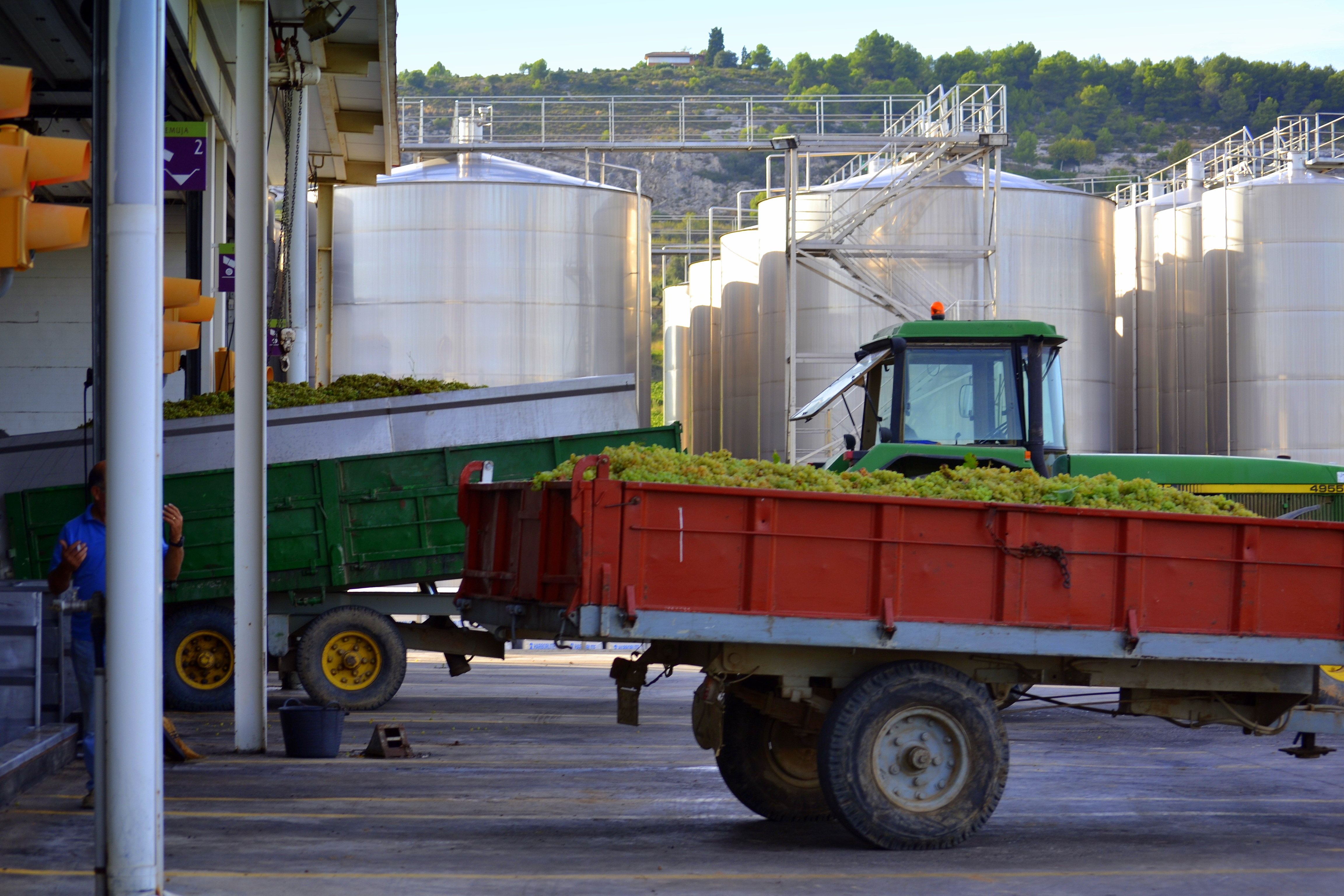 El mes de Setembre és la collita del raïm i l'activitat a les vinyes i cellers es ben gran.